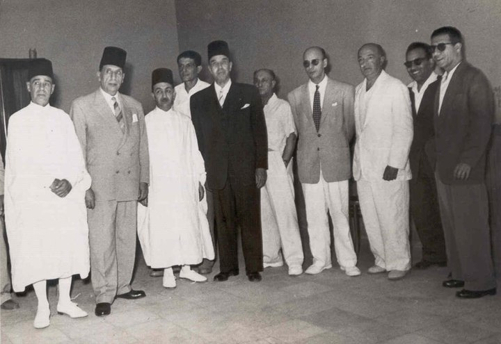 Ministres du premier gouvernement Ben Ammar (de gauche à droite) : Naceur Ben Said, Aziz Djellouli, Mongi Slim, Chedly Rehaiem, Tahar Ben Ammar, Ali Belhadj, Sadok Mokaddem, Tahar Zaouche, Mohamed Masmoudi et Hédi Nouira